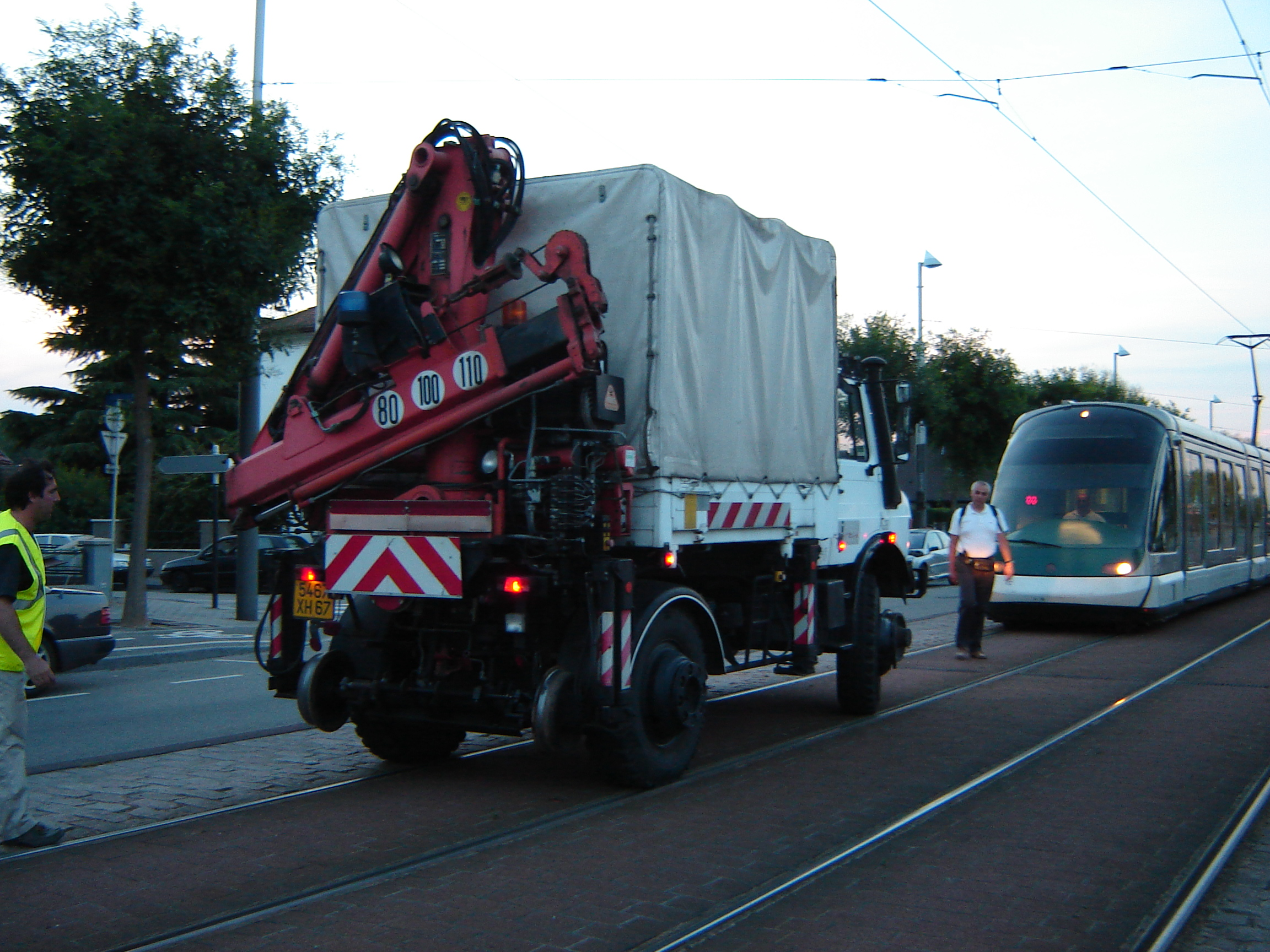 Unimog U1650L rail-route de la CTS, à Strasbourg